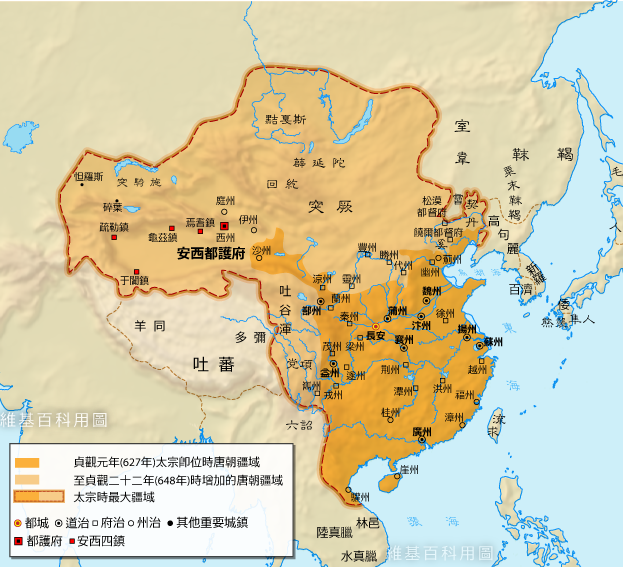 唐太宗时疆域图